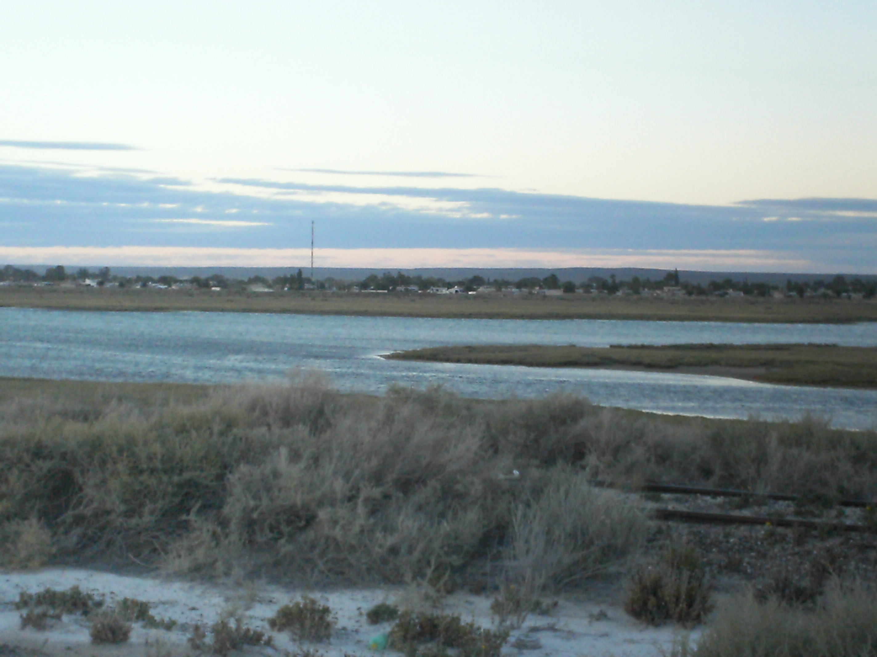 vista de la ciudada desde la playa